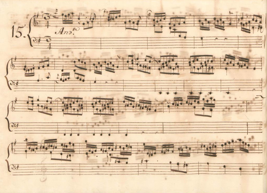 La sonate K. 259, telle qu'elle se présente dans le manuscrit de Parme, volume IV no. 15.